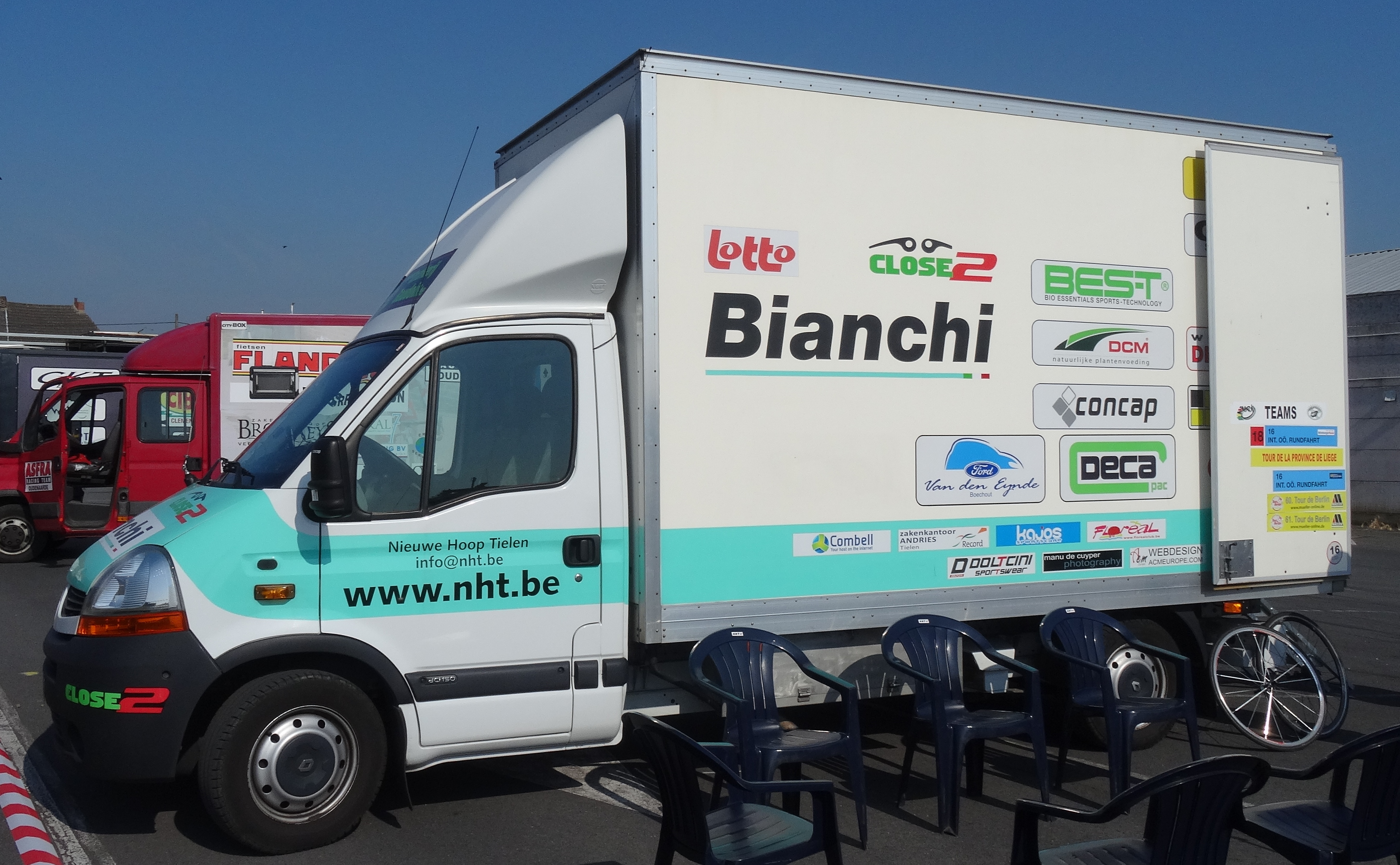 Reportage réalisé le samedi 17 mai à l'occasion du départ du Grand Prix Criquielion 2014 à Boussu, Belgique.